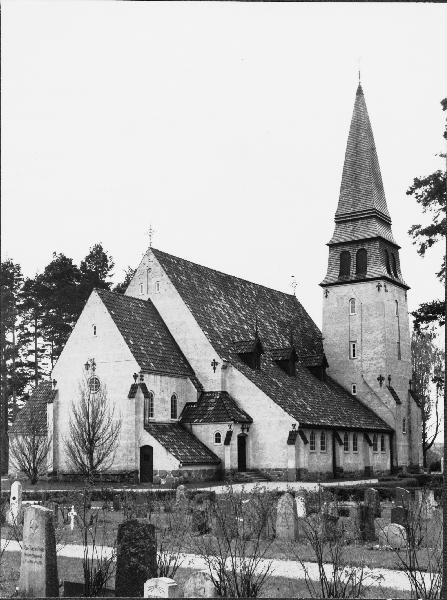 Kyrkan mot nordöst. Kategori: (01) ExteriörerKyrkan mot nordöst.